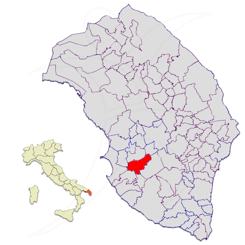 Il territorio del comune di Matino nella provincia di Lecce